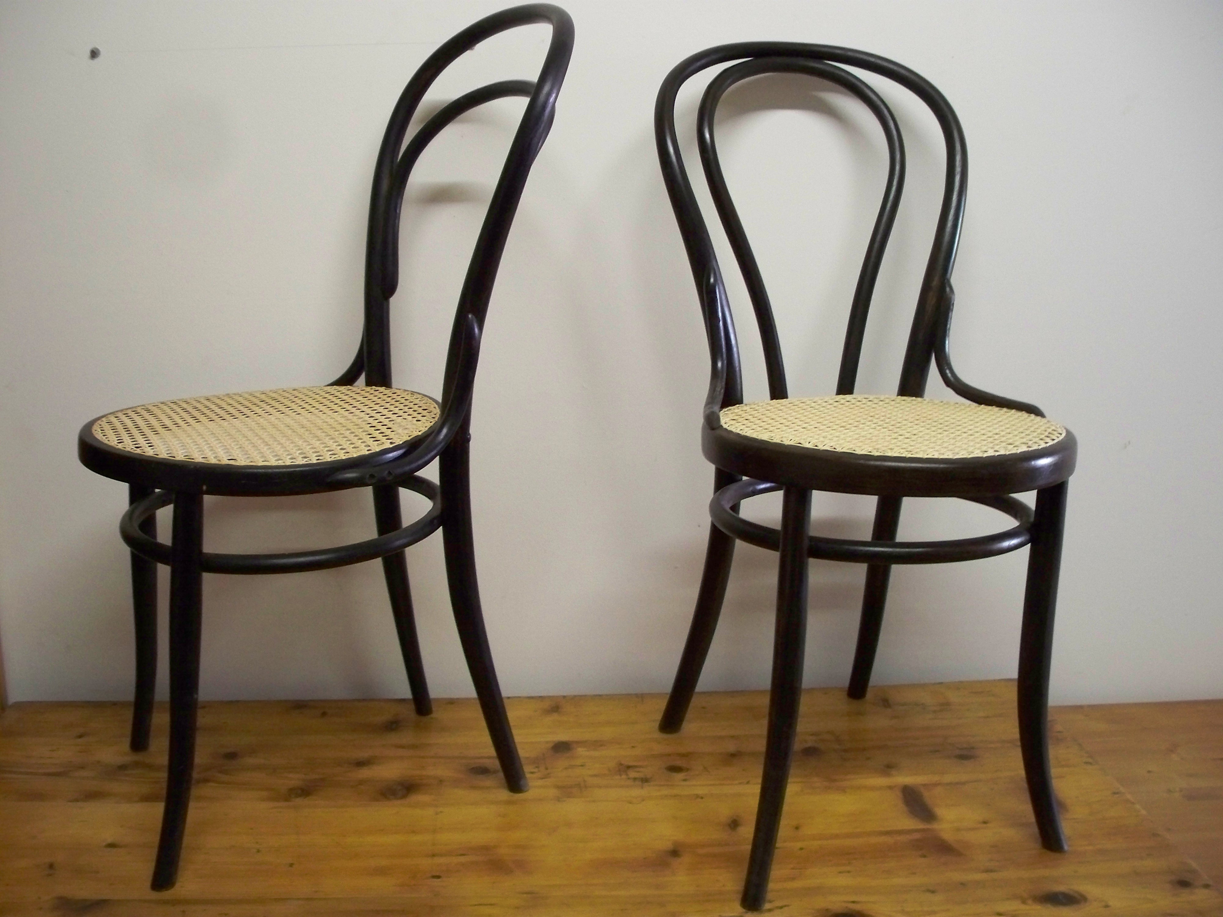 krzeslaThoneta